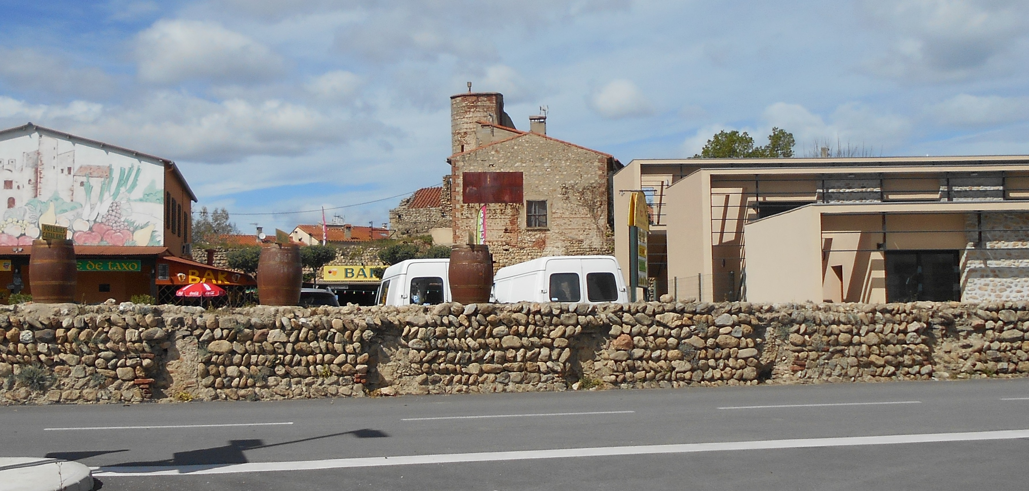 El poble murallat de Tatzó d'Avall, a Argelers de la Marenda